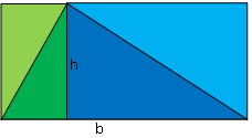 Demostració gràfica de la fórmula de l'àrea del triangle a base de partir-lo en dos triangles rectangles